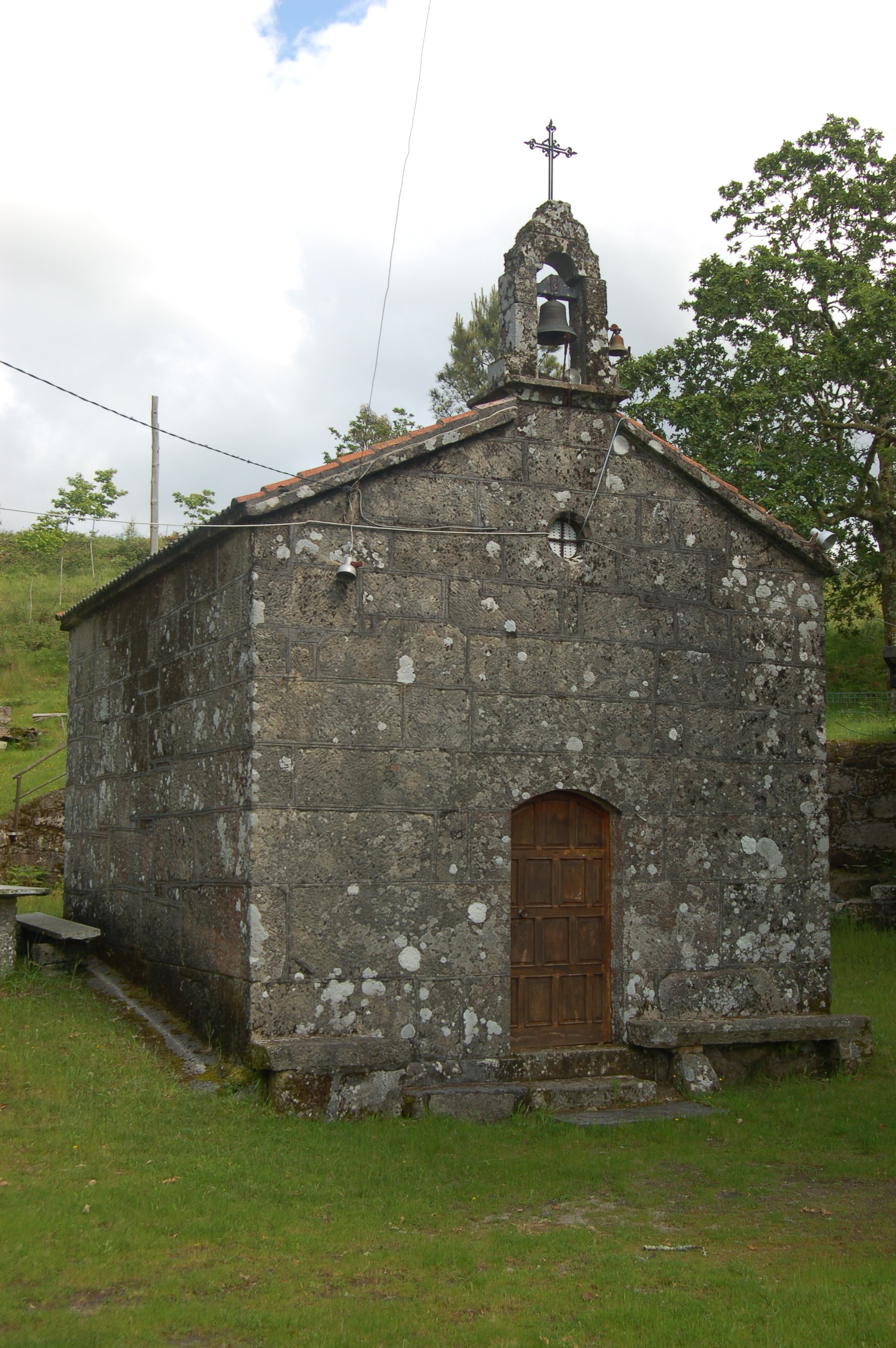 Ermida da Virxe das Neves, en Ribalta (Loureiro, Cerdedo-Cotobade)